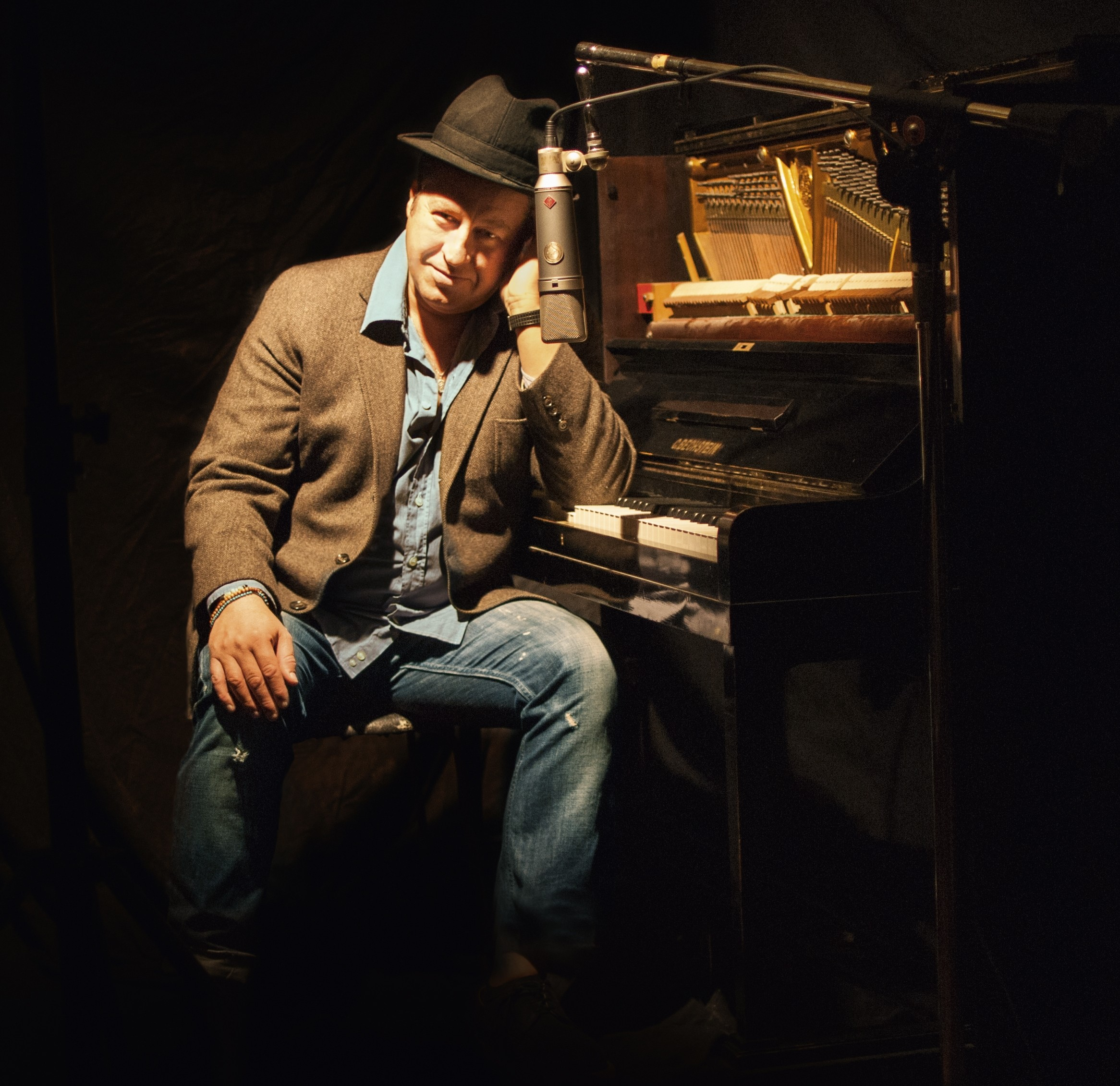 Artisten Mauro Scocco.